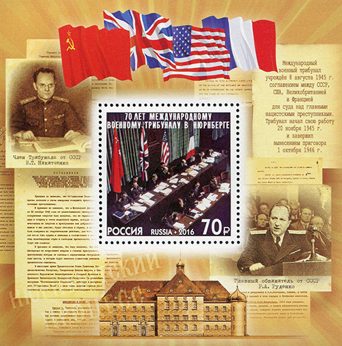 Почтовый блок России, выпущенный 14 декабря 2016 года и посвящённый 70-летию Международного военного трибунала в Нюрнберге. Зал суда, где проходил Нюрнбергский процесс, здание суда, документы, портреты члена Трибунала от СССР И. Т. Никитченко и главного обвинителя от СССР Р. А. Руденко. Государственный флаги СССР, Великобритании, США, Франции. Номер по каталогу ЦФА — 2187. Художник — А. Московец. Тираж — 70000.